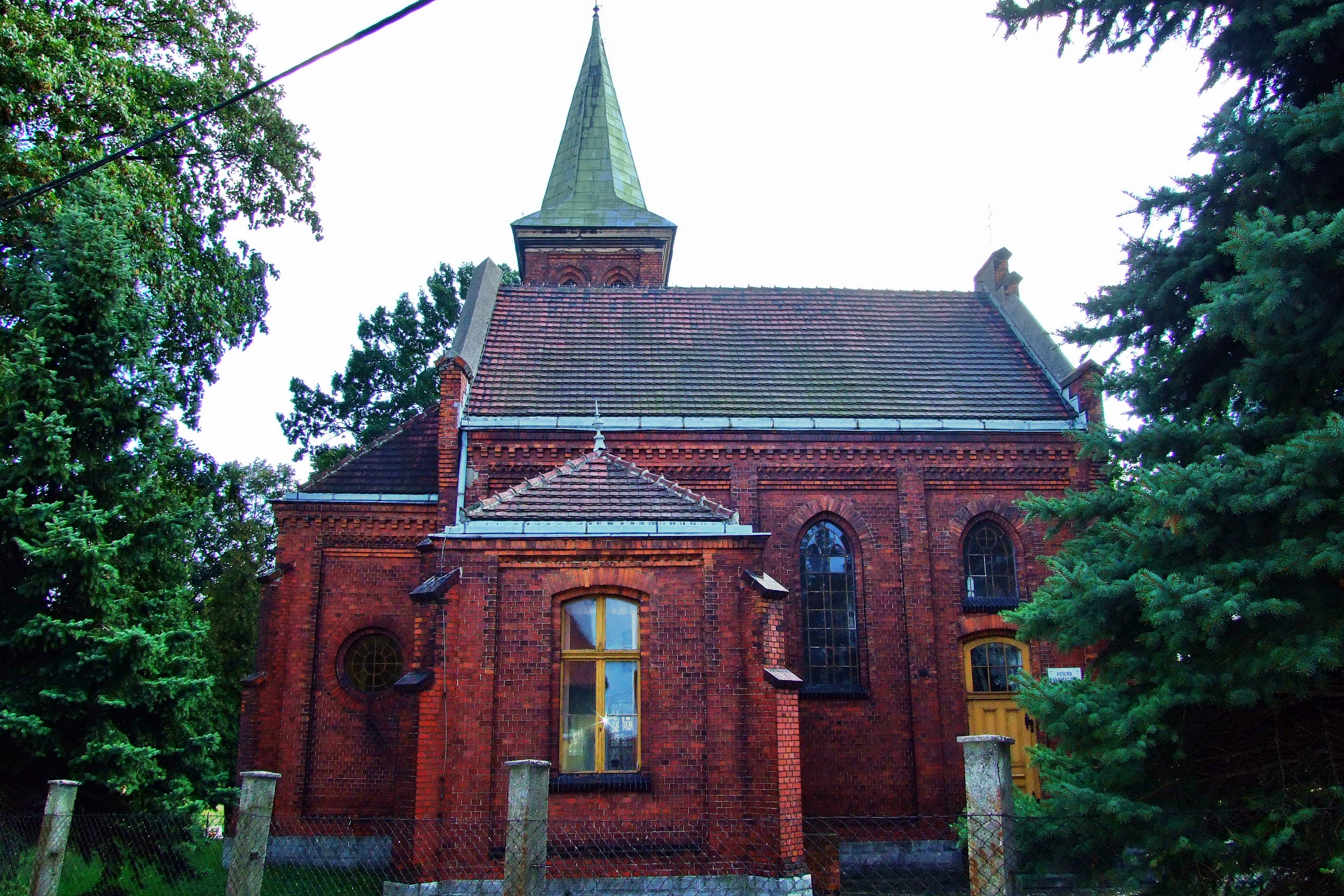 Ewangelicki kościół Świętych Piotra i Pawła w Pyskowicach